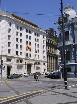 Edificio Actual CCNI